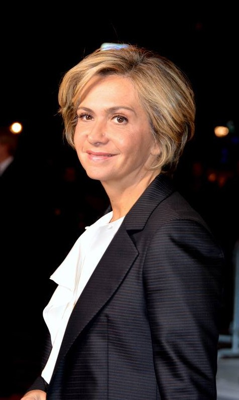 Valérie Pécresse à la cérémonie des César